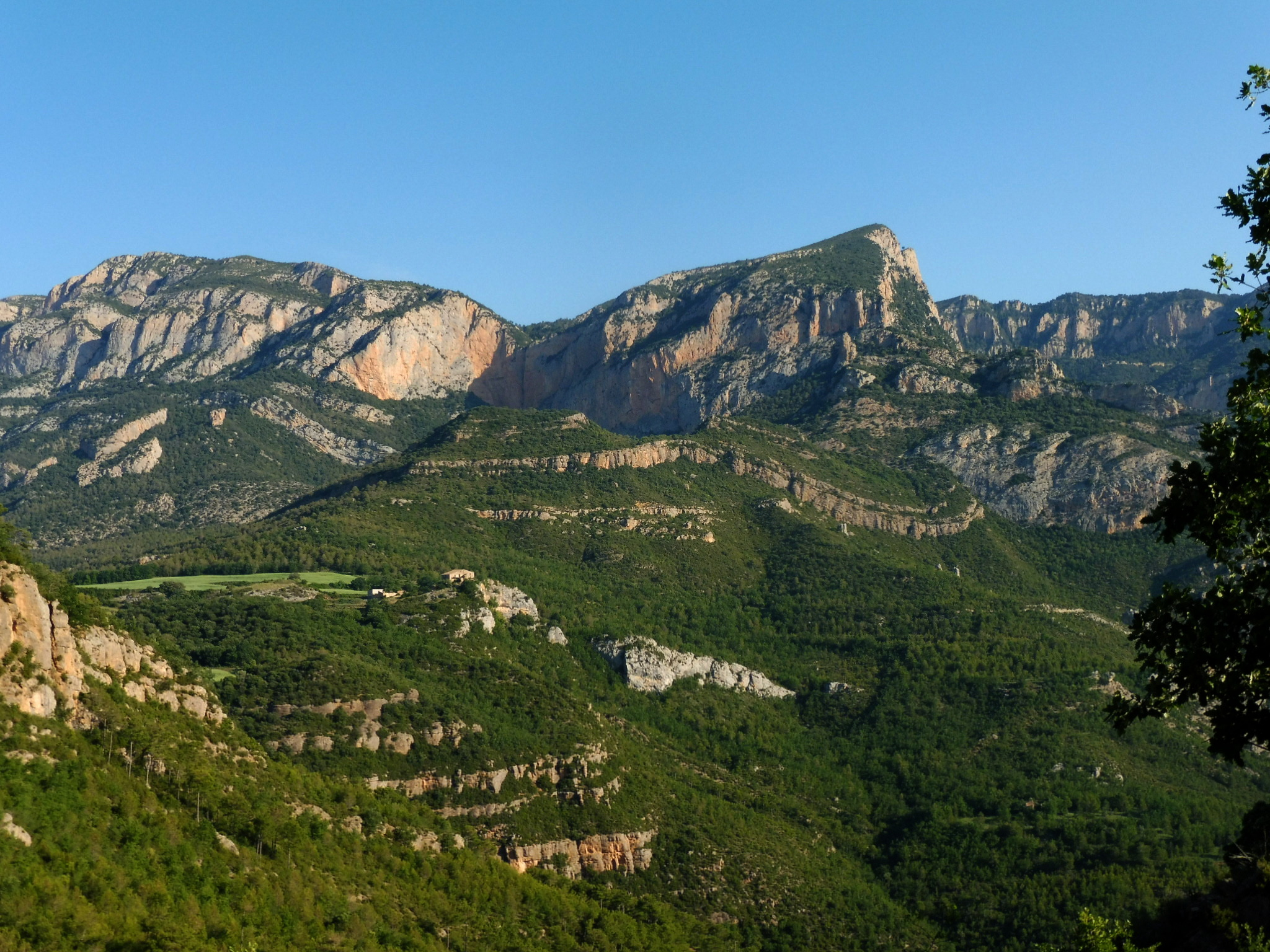 Serra d'Aubenç i el Tossal (Peramola) des de la pista de Castell-llebre This is a a photo of a natural area in Catalonia, Spain, with id: ES510175